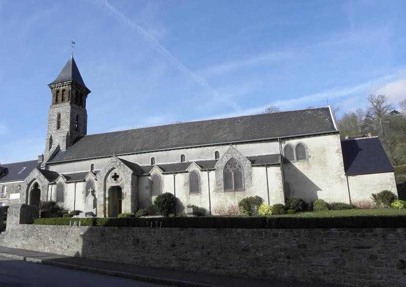 Façade sud de l'église Saint-Pierre du Mont-Dol (35).